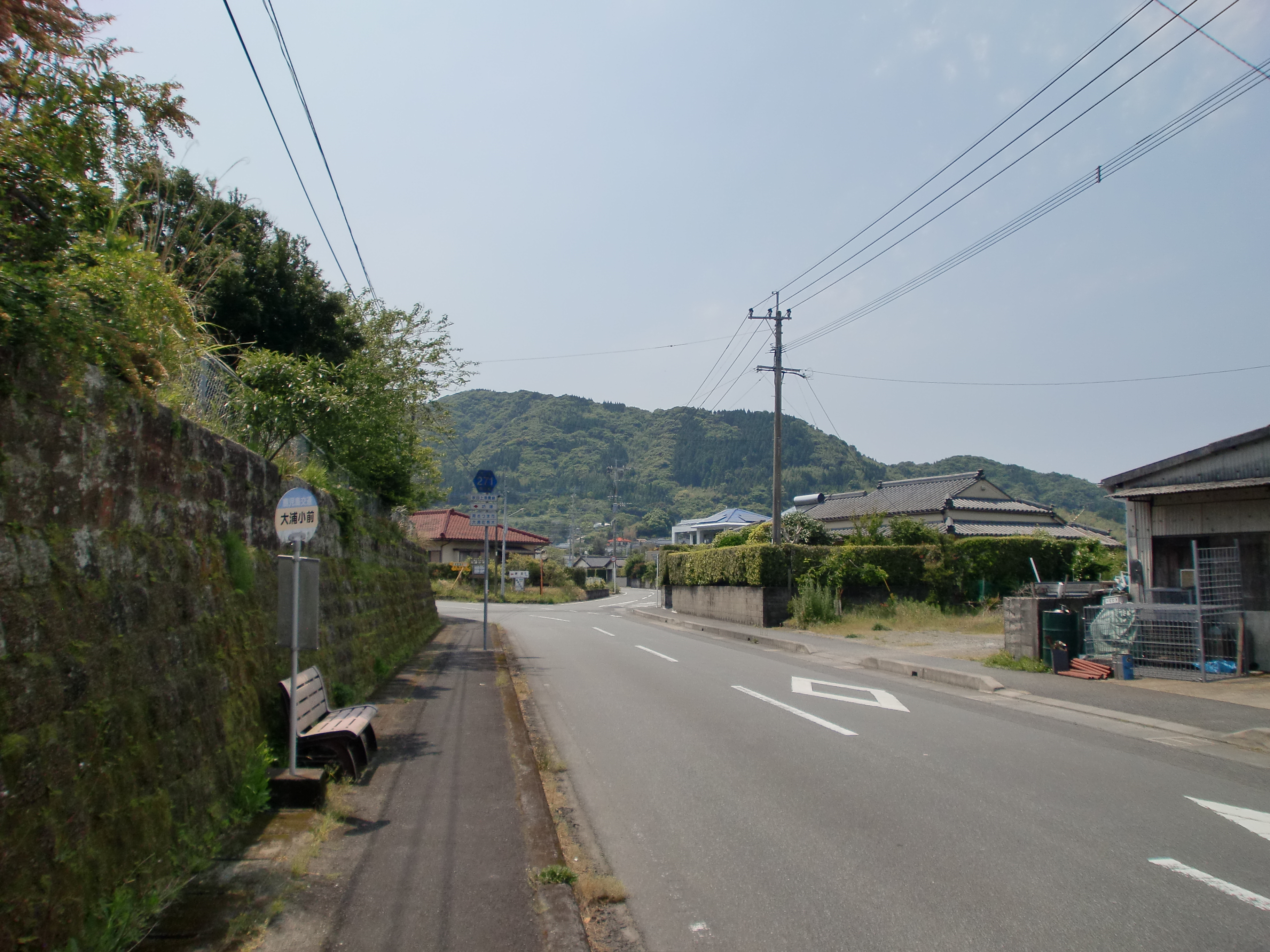 鹿児島県道271号秋目上津貫線を大浦小学校前から秋目方面に望む。